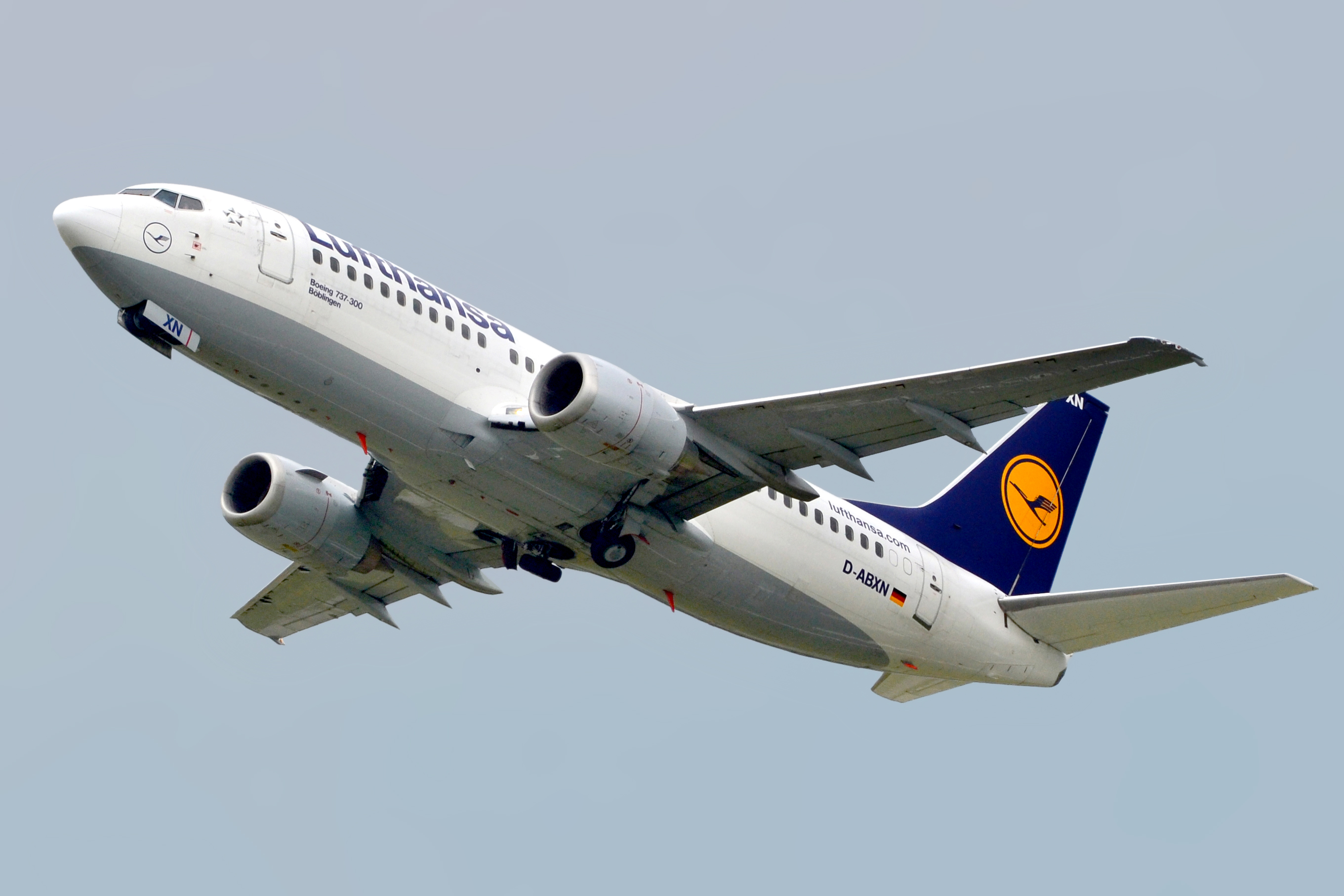 Boeing 737-300 (D-ABXN)